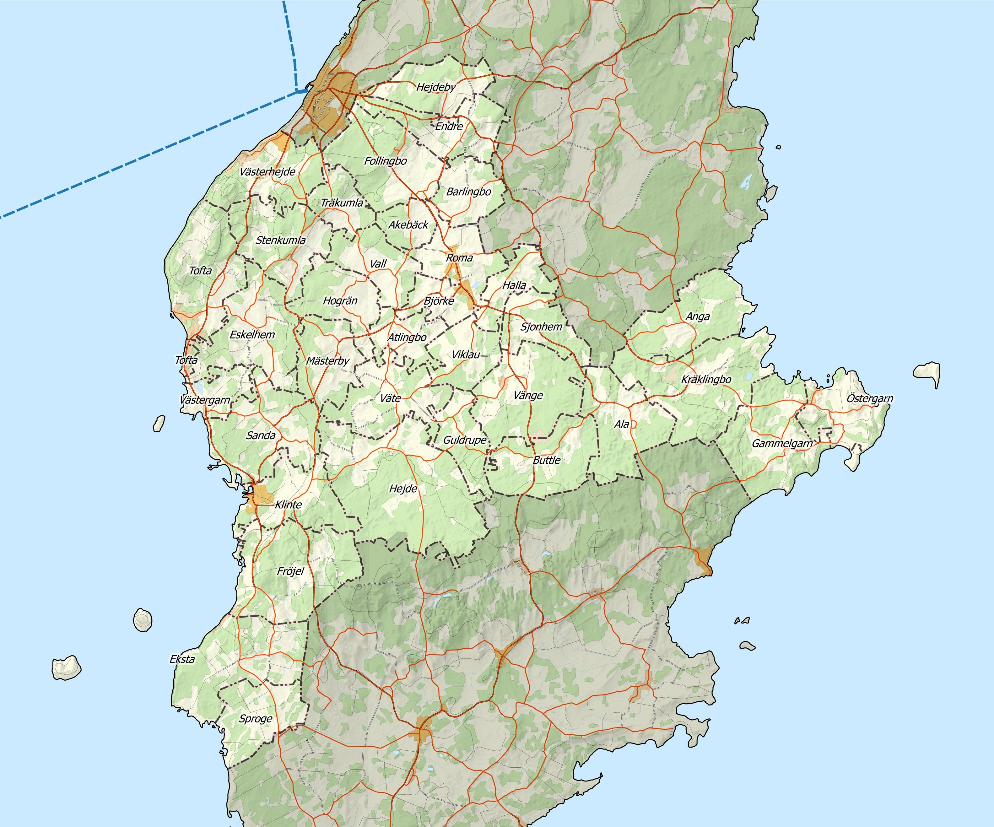 Gotlands Medeltreding. Manér